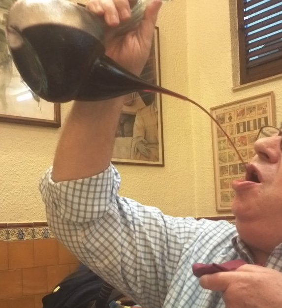 Detalle de cómo un hombre bebe de un porrón de vino. Foto tomada en Badalona (España).